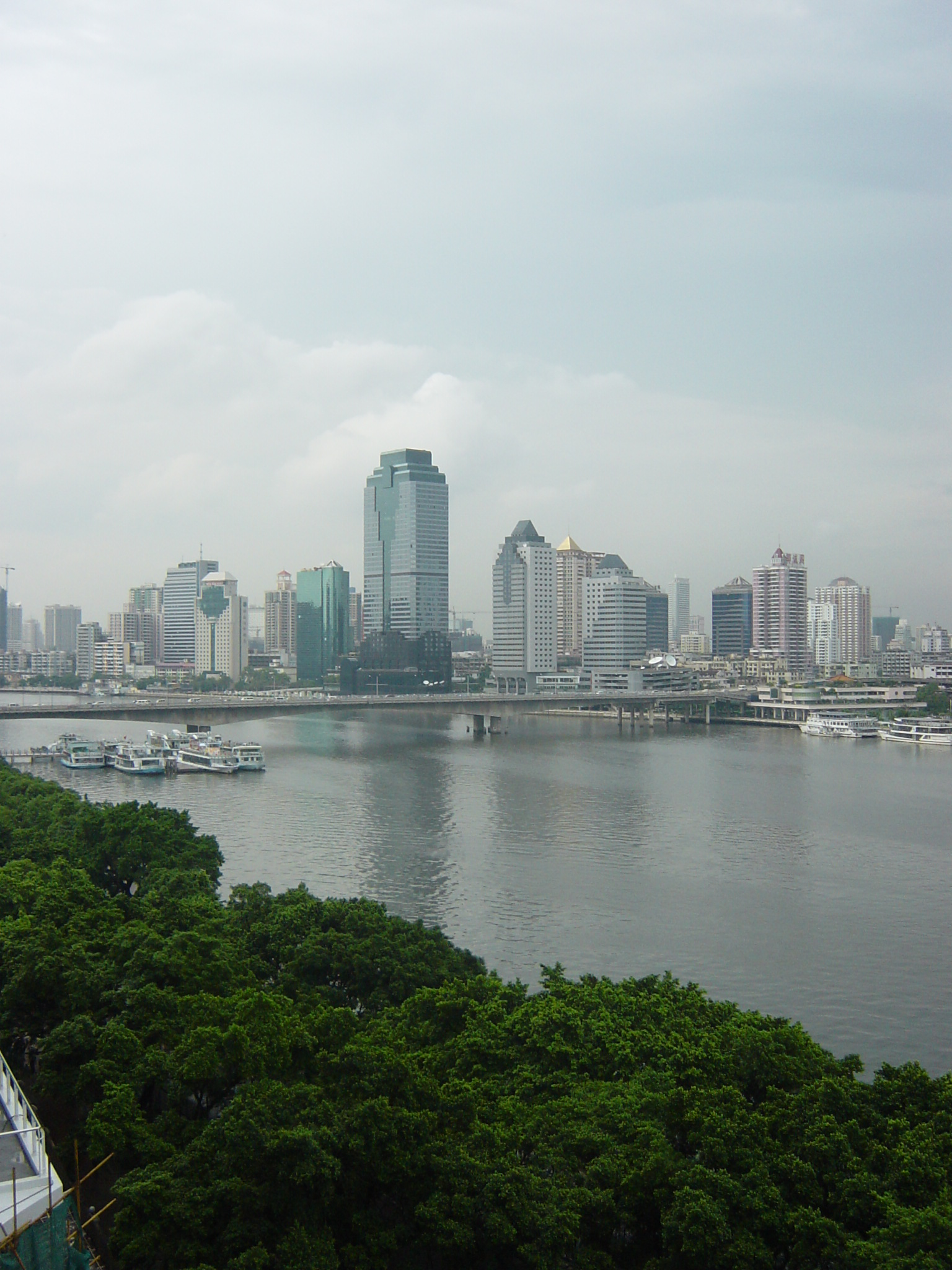 广州江湾桥一带景色，由上载者User:老火豆沙煲于2004年8月21日拍摄。